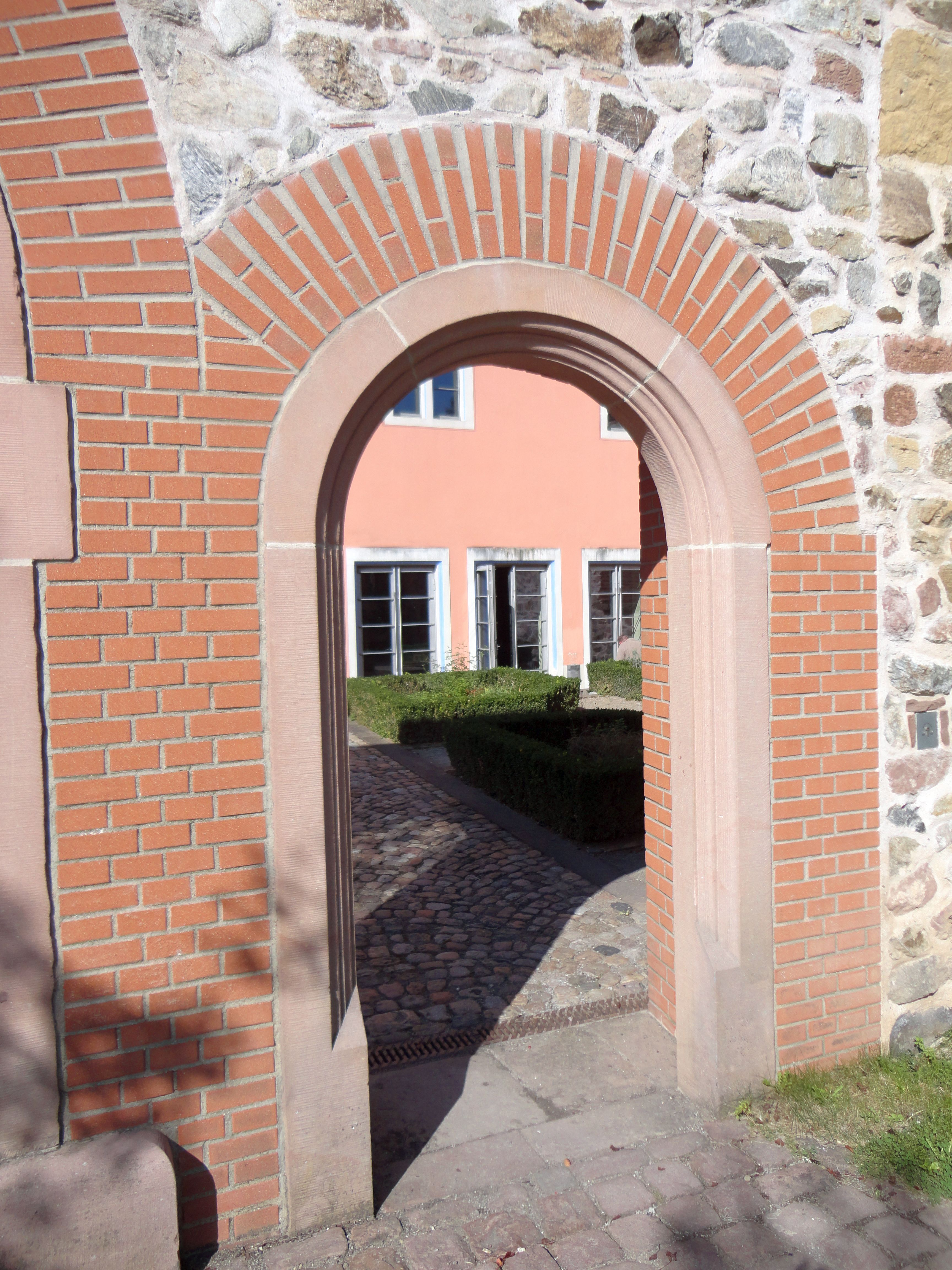 Eingangstor zur Großen Stube der Talvogtei in Kirchzarten